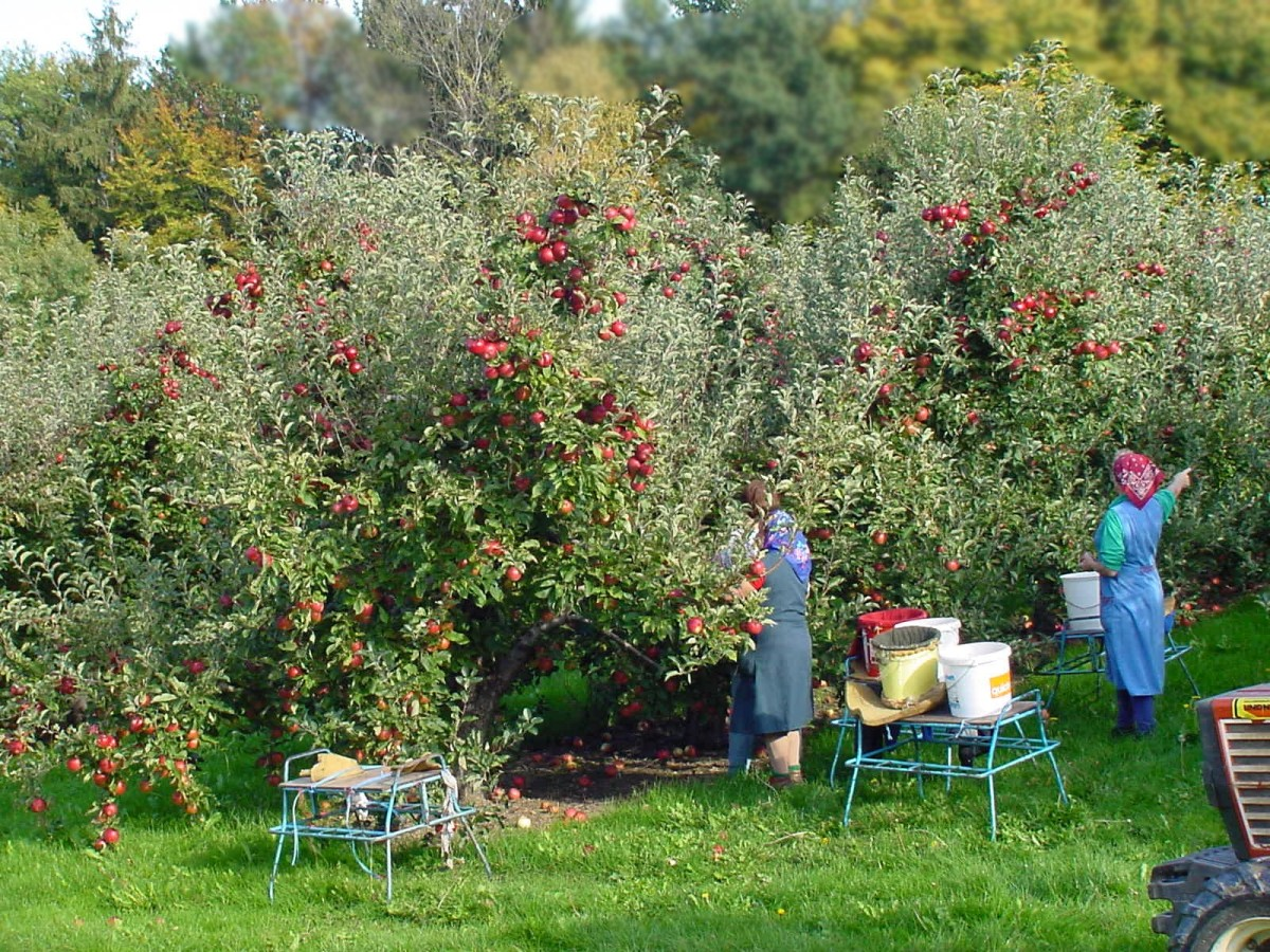 Apfelernte in der Steiermark (Bild 1)